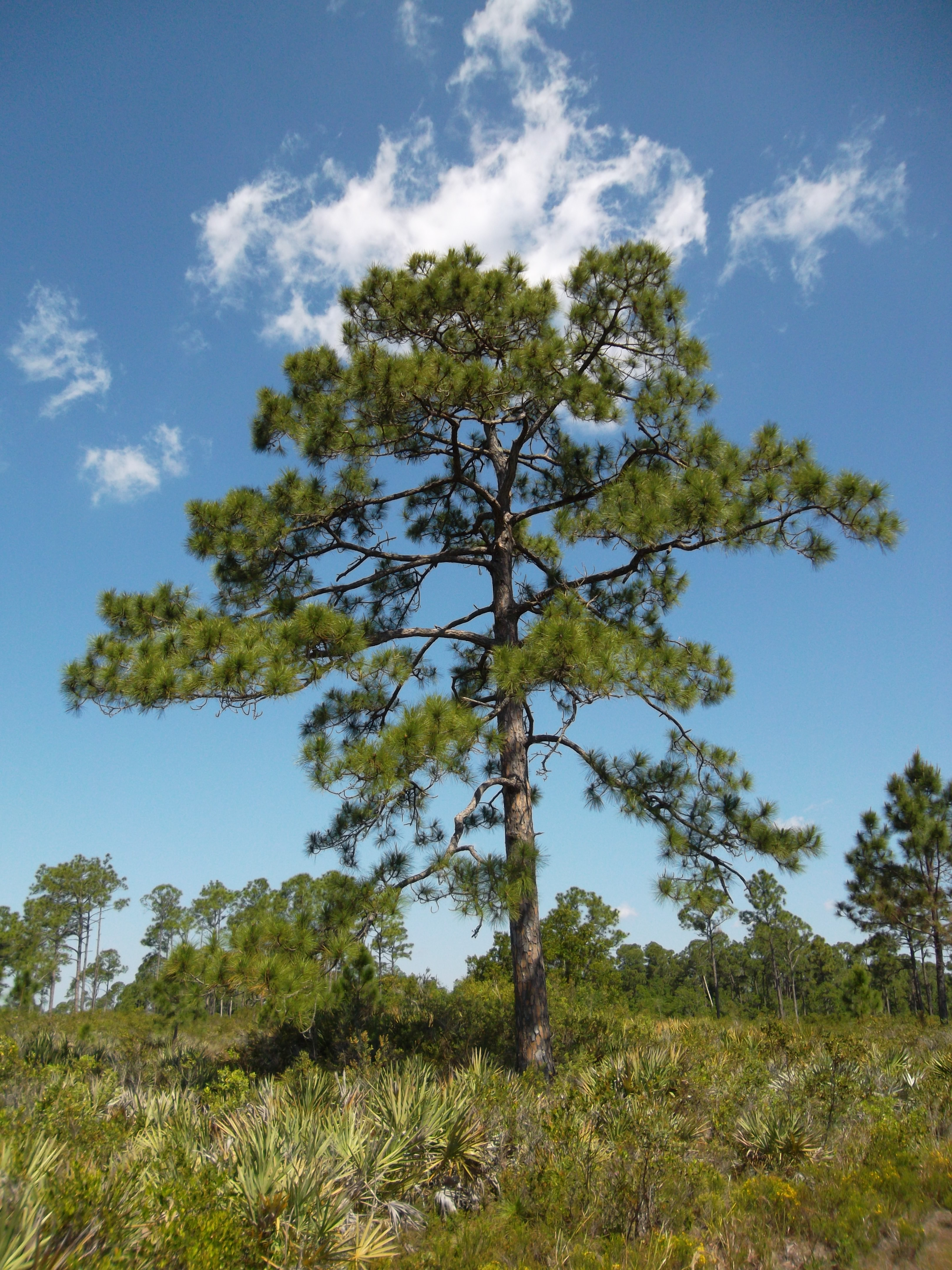 Beautiful Pine Tree